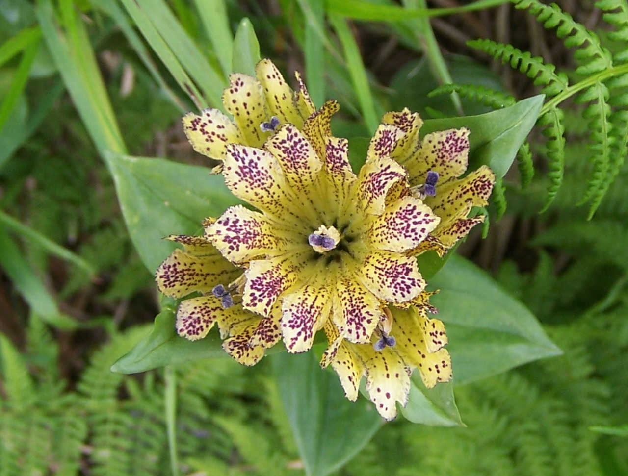 Gentiana punctata (pl. goryczka kropkowana)